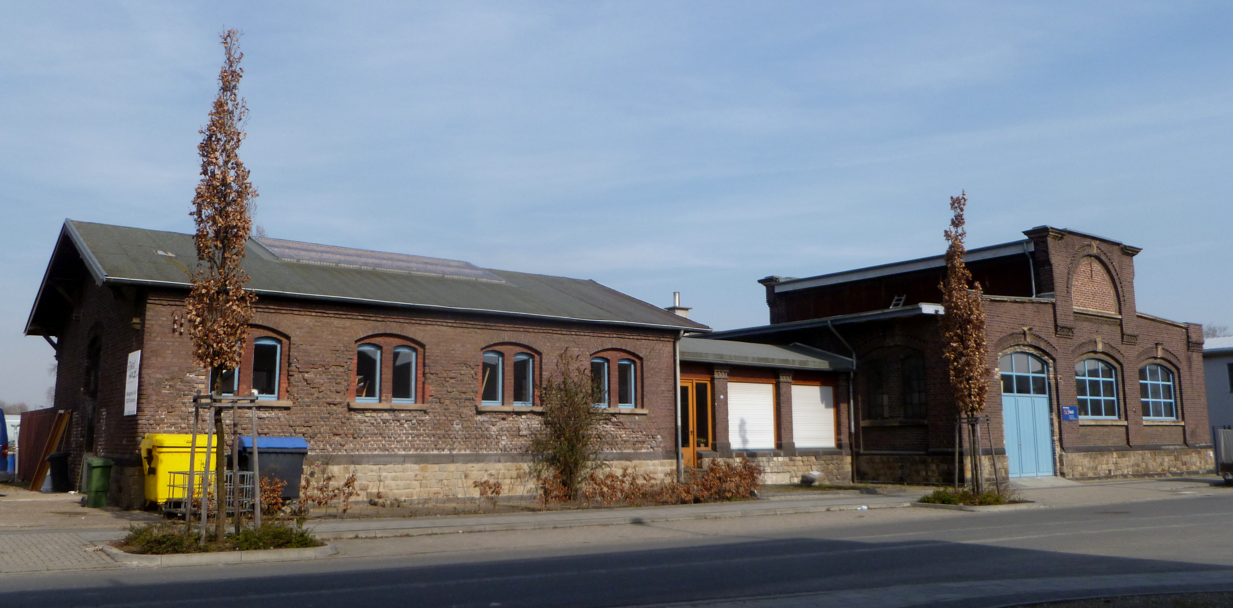 Alter Schlachthof Aachen - Kuttlerei; Baudenkmal